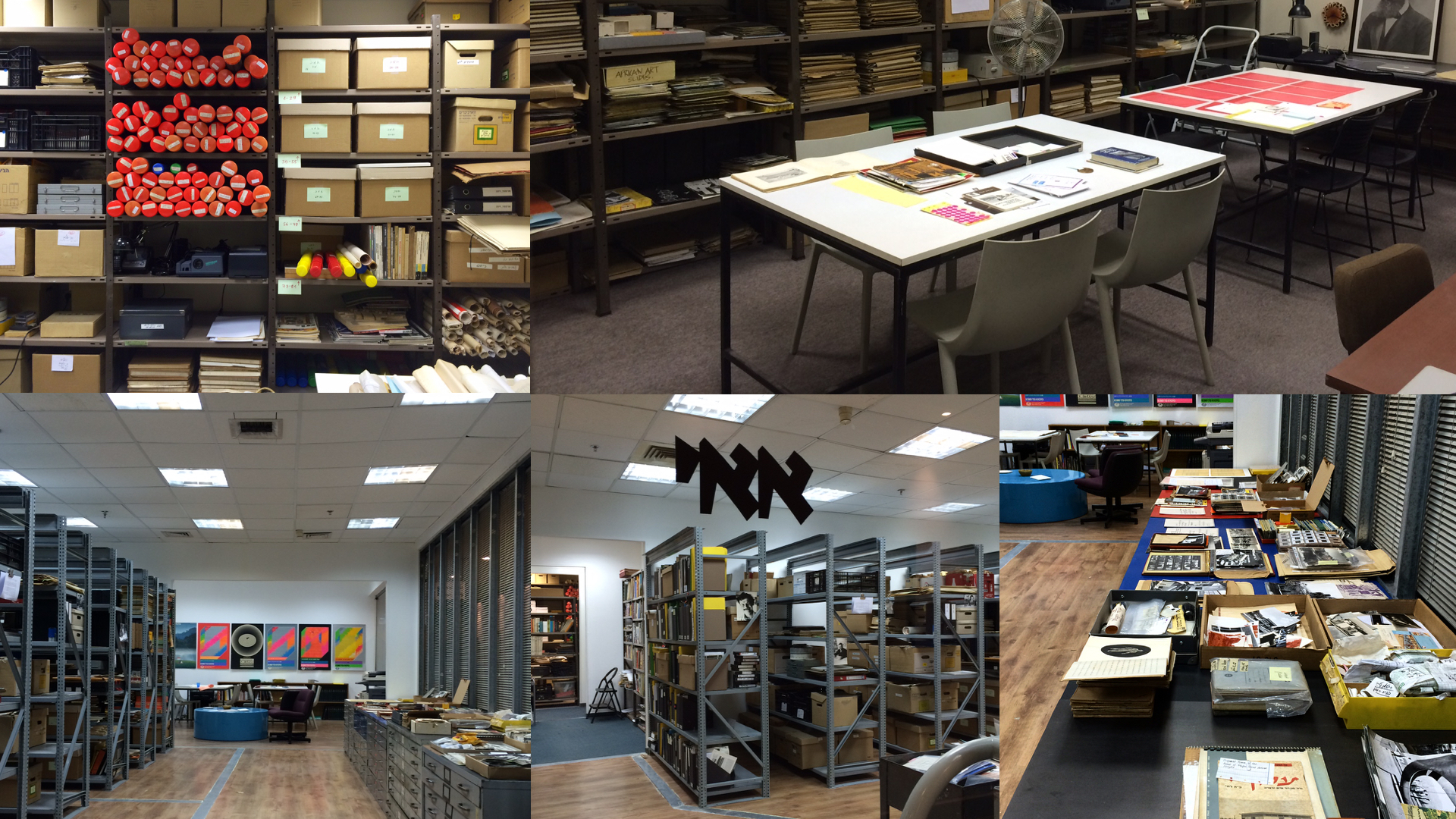 מראות בחלק מהחללים בארכיון אדריכלות ישראל, נובמבר 2014